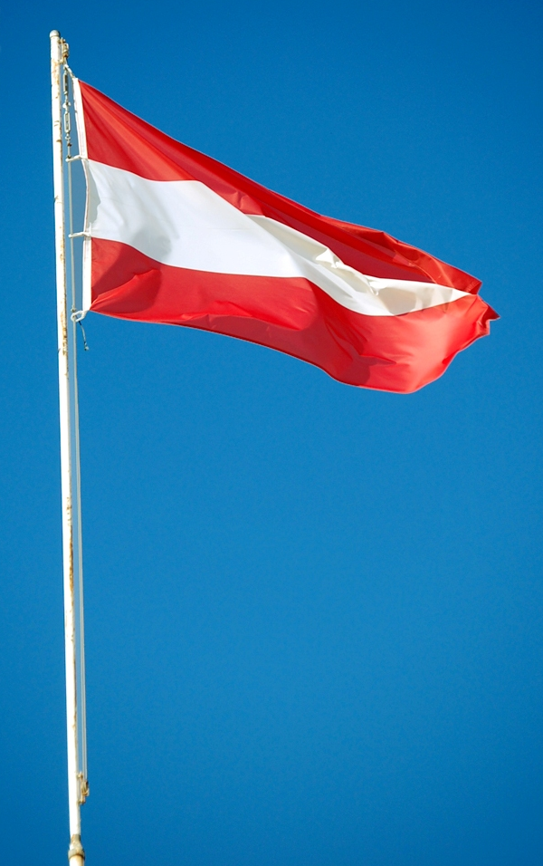 דגל אוסטריה מעל בניין הוספייס אוסטריה בירושלים